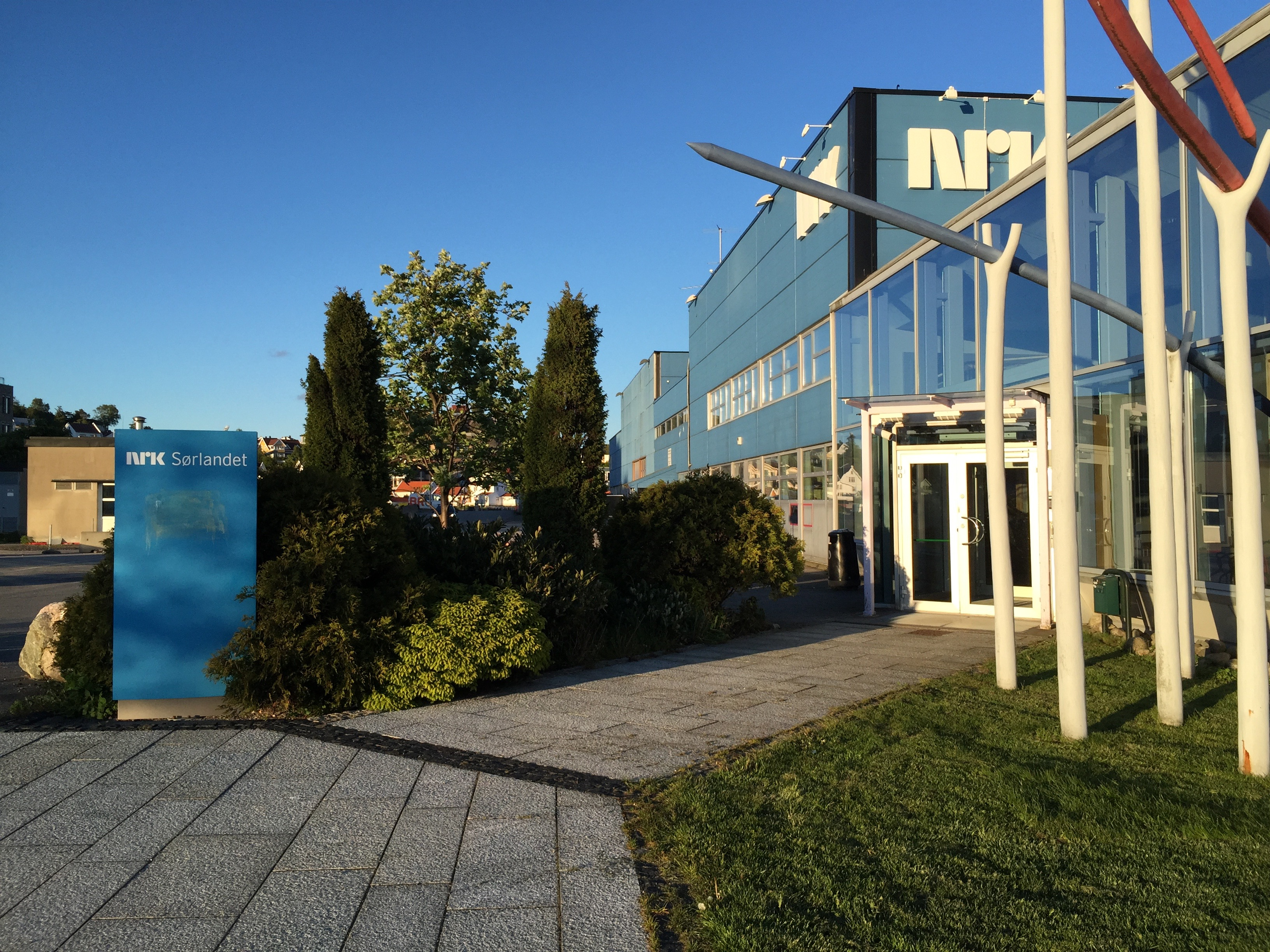 NRK Sørlandet